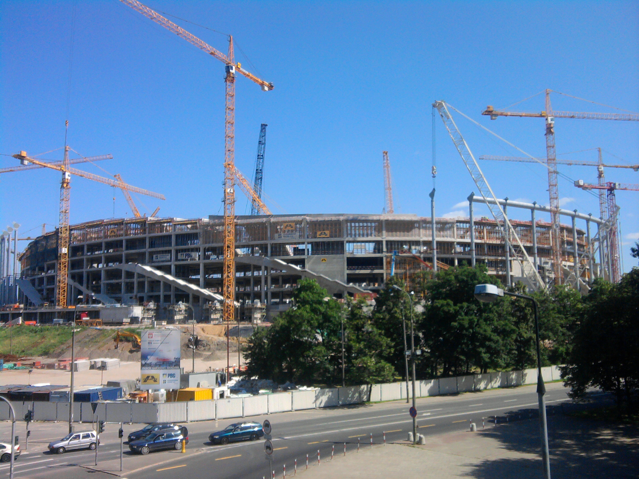 Budowa Stadionu Narodowego w Warszawie